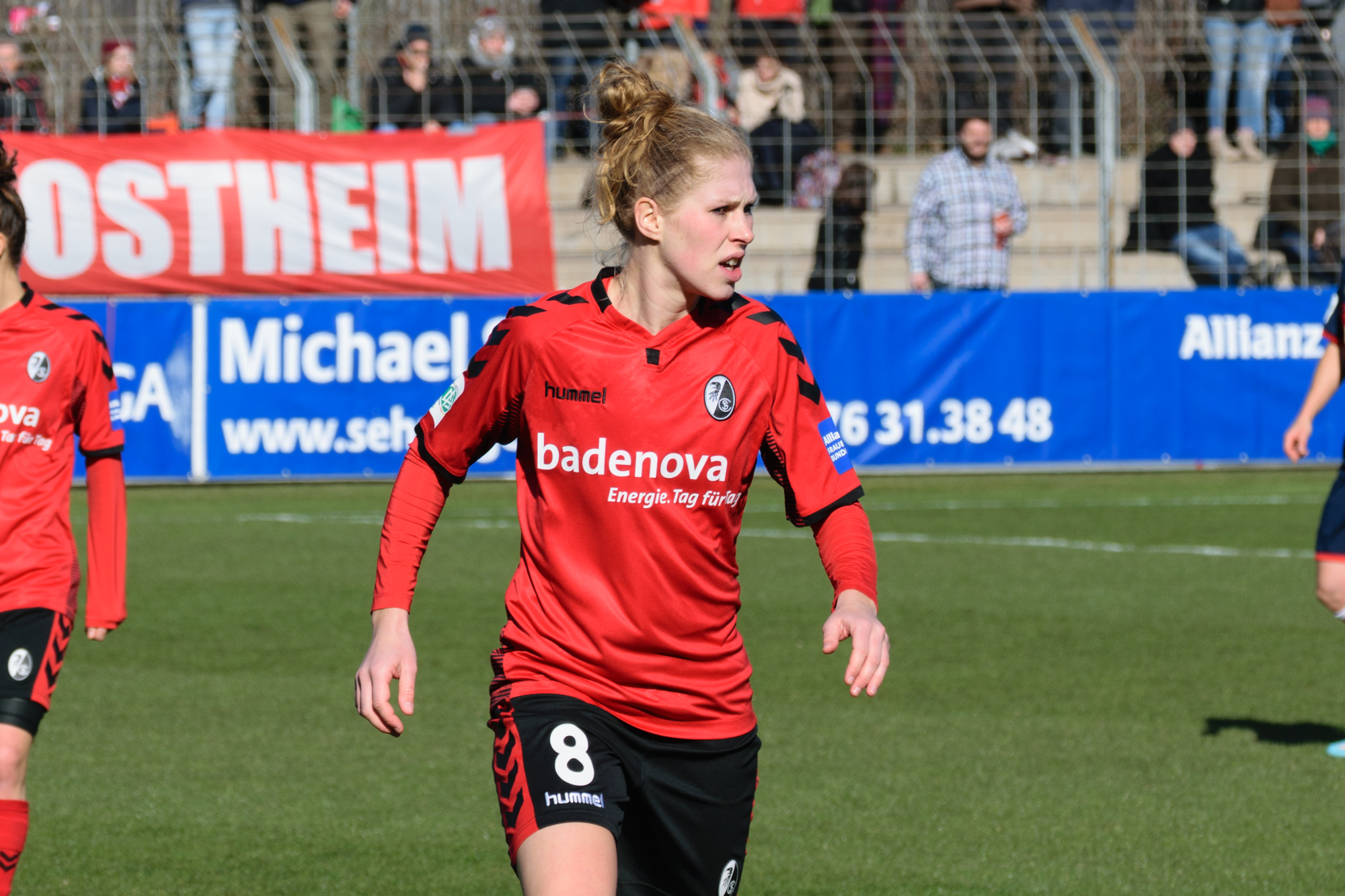 Rebecca Knaak during SC Freiburg (women) vs FC Bayern (women), February 2018